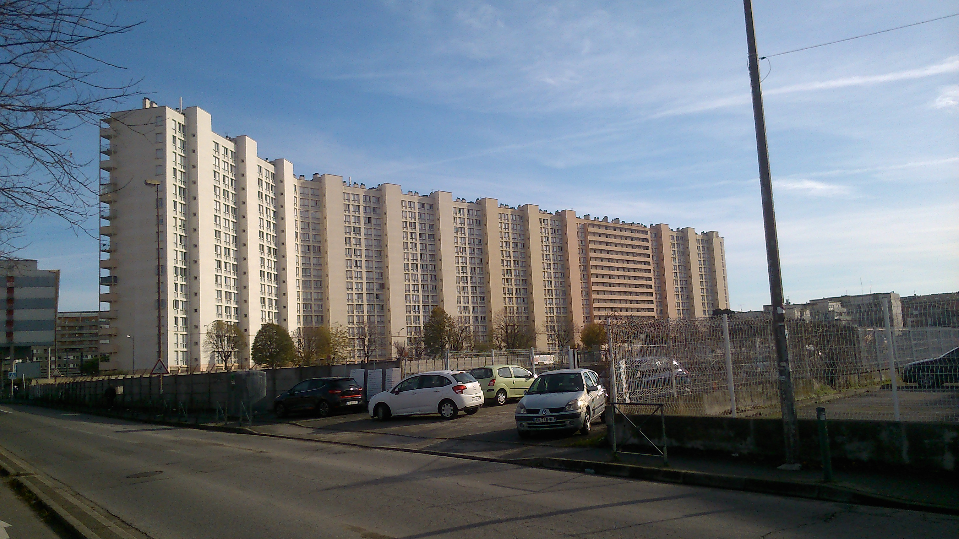 Le Crystal